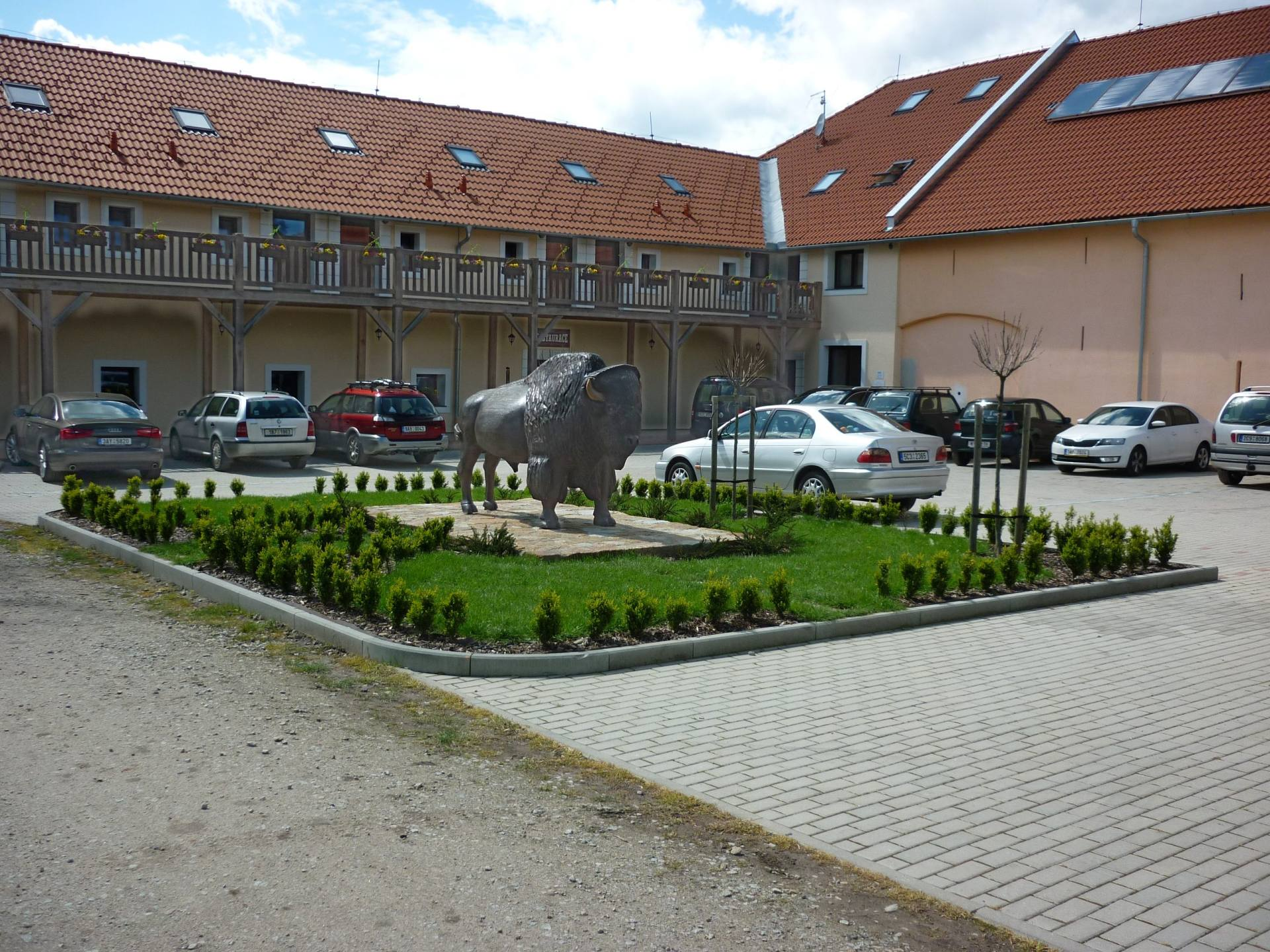 Bizonní farma a penzion Rožnov